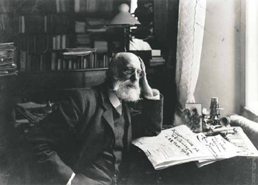 Fotograf Aron Jonason (1838–1914)